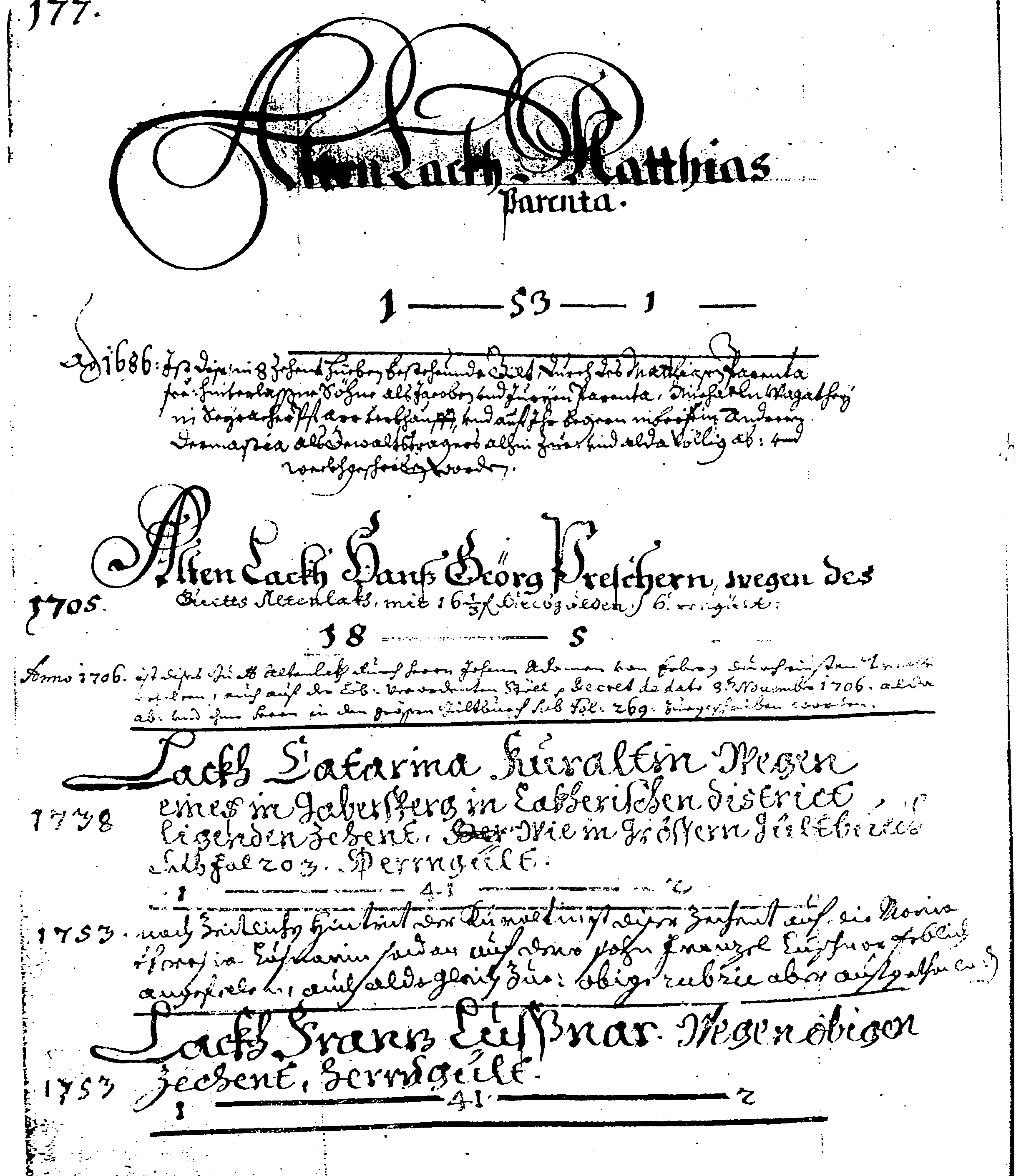 Imenjska knjiga za Kranjsko, vložek za deželne svobodnike, 1662-1757.